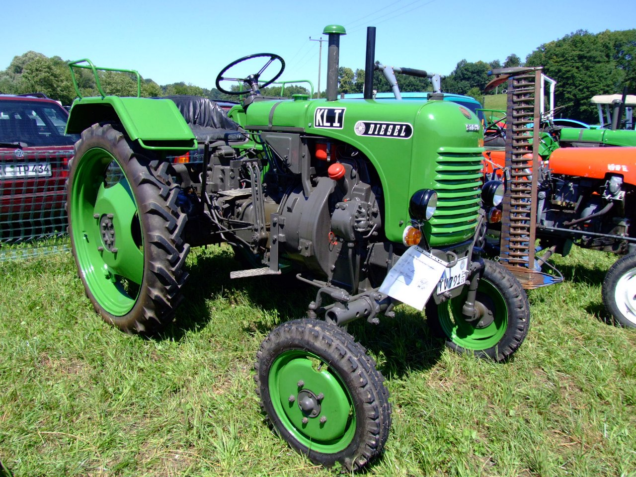 Steyr-Traktor Typ 80a mit 15 PS, Baujahr 1955